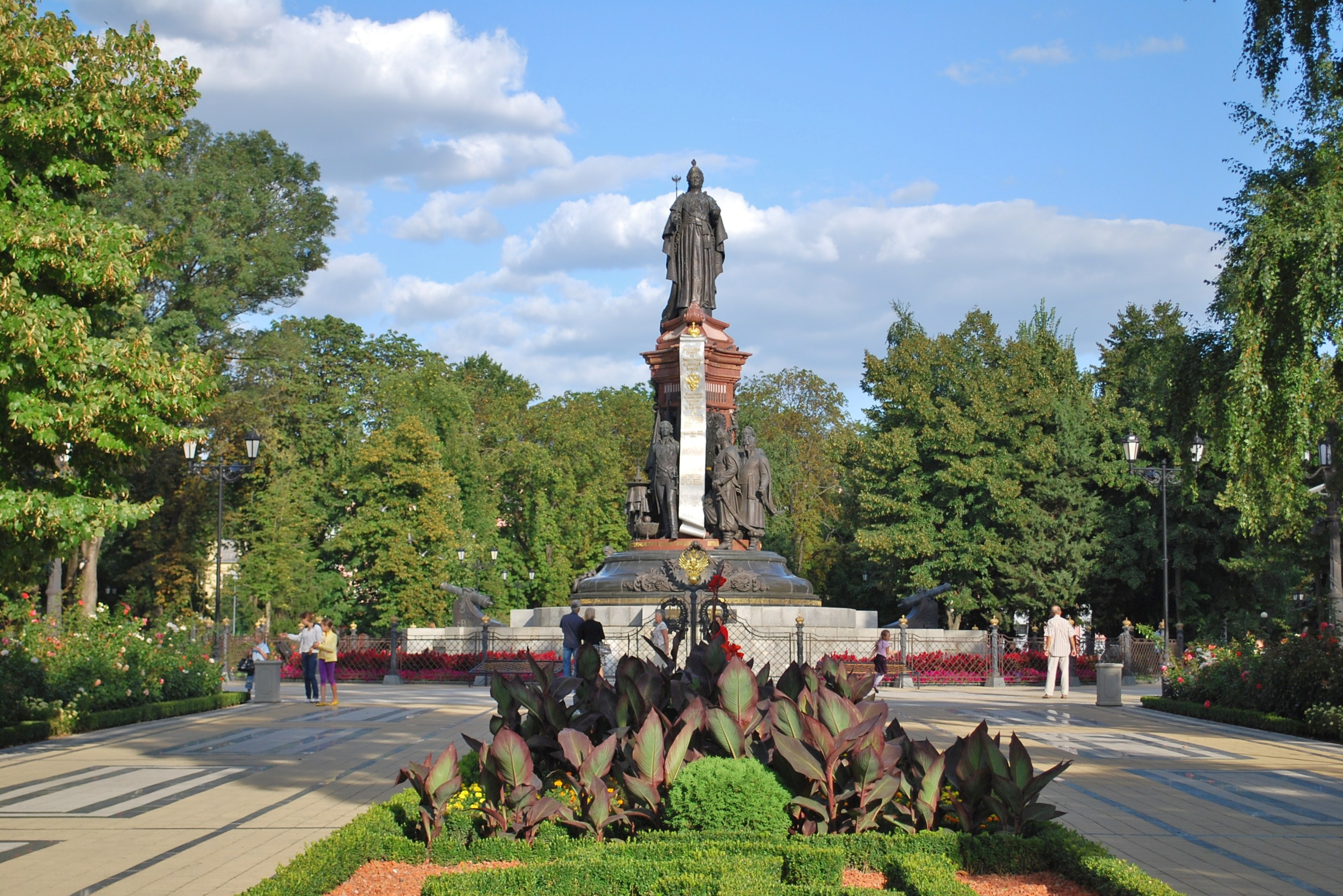 Памятник Екатерине Великой, основательнице Екатеринодара